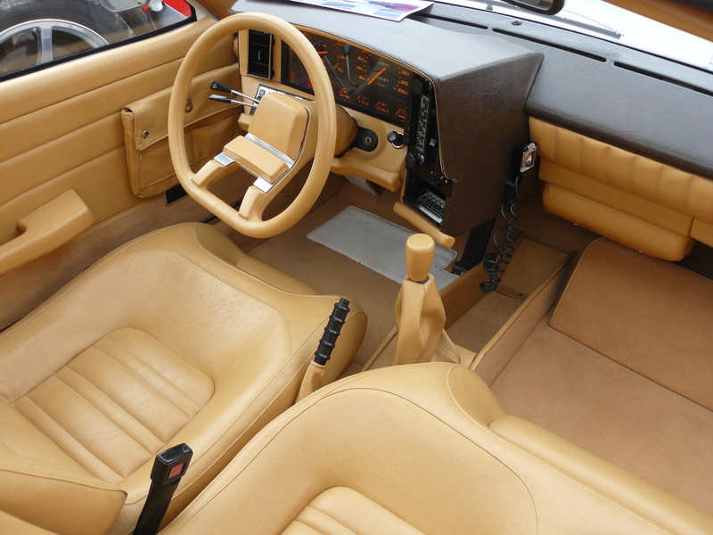 Reims 2012